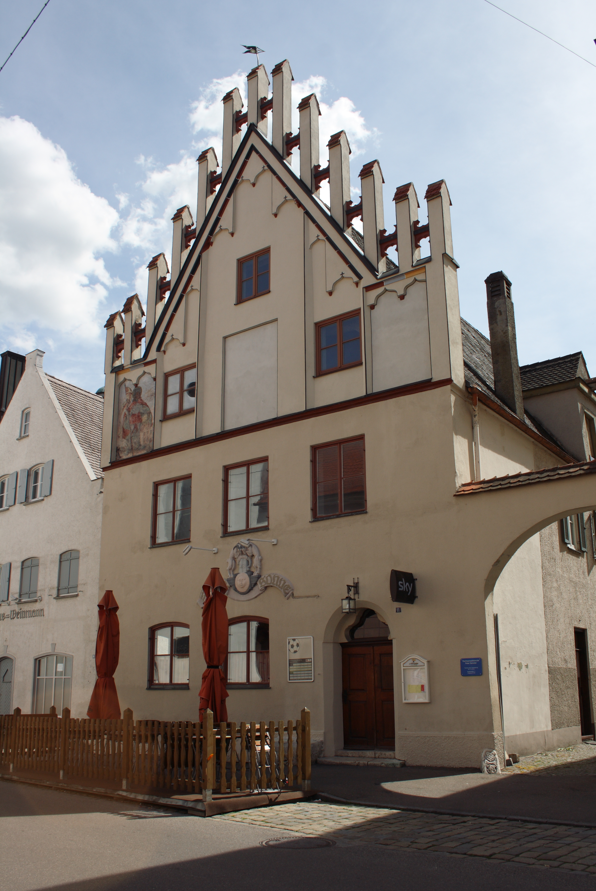 Ehemaliges Bruckhaus in Lauingen im Landkreis Dillingen an der Donau (Bayern), Brüderstraße 11